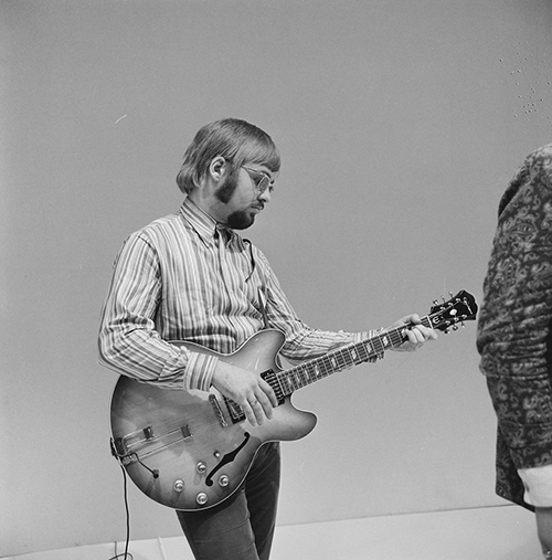 Q65 in het televisieprogramma Fanclub